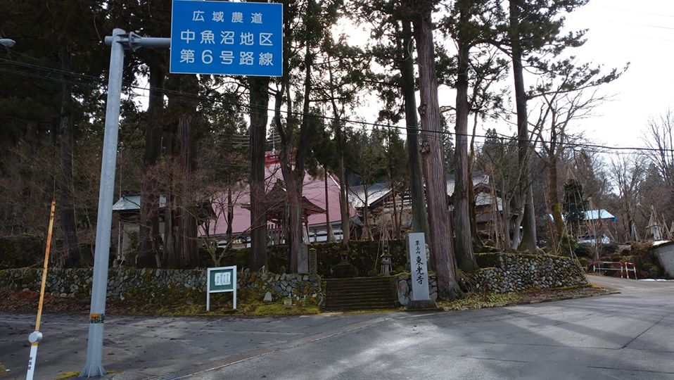 東光寺 2020-01-14